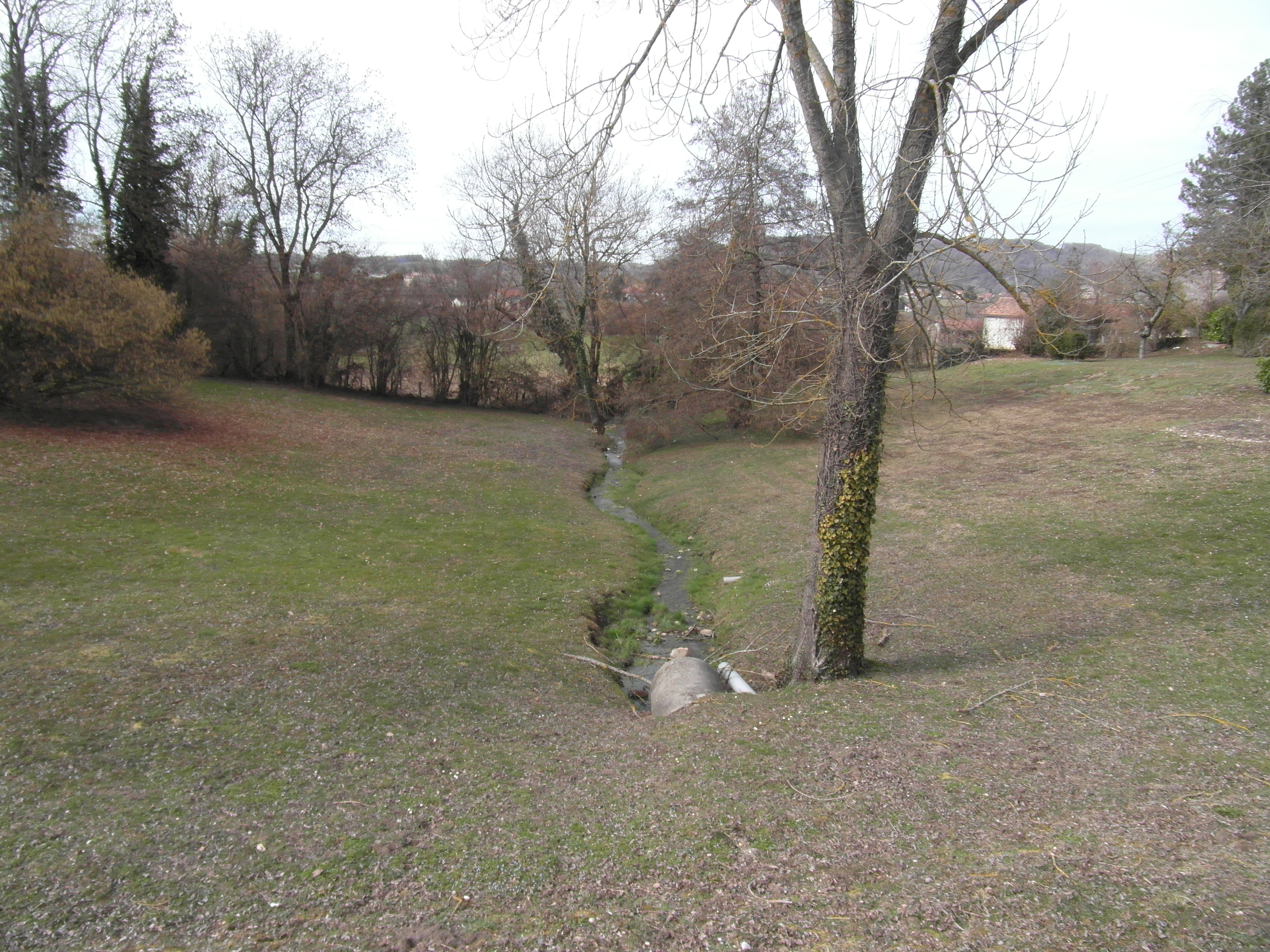 Source de la Bourbre à Burcin